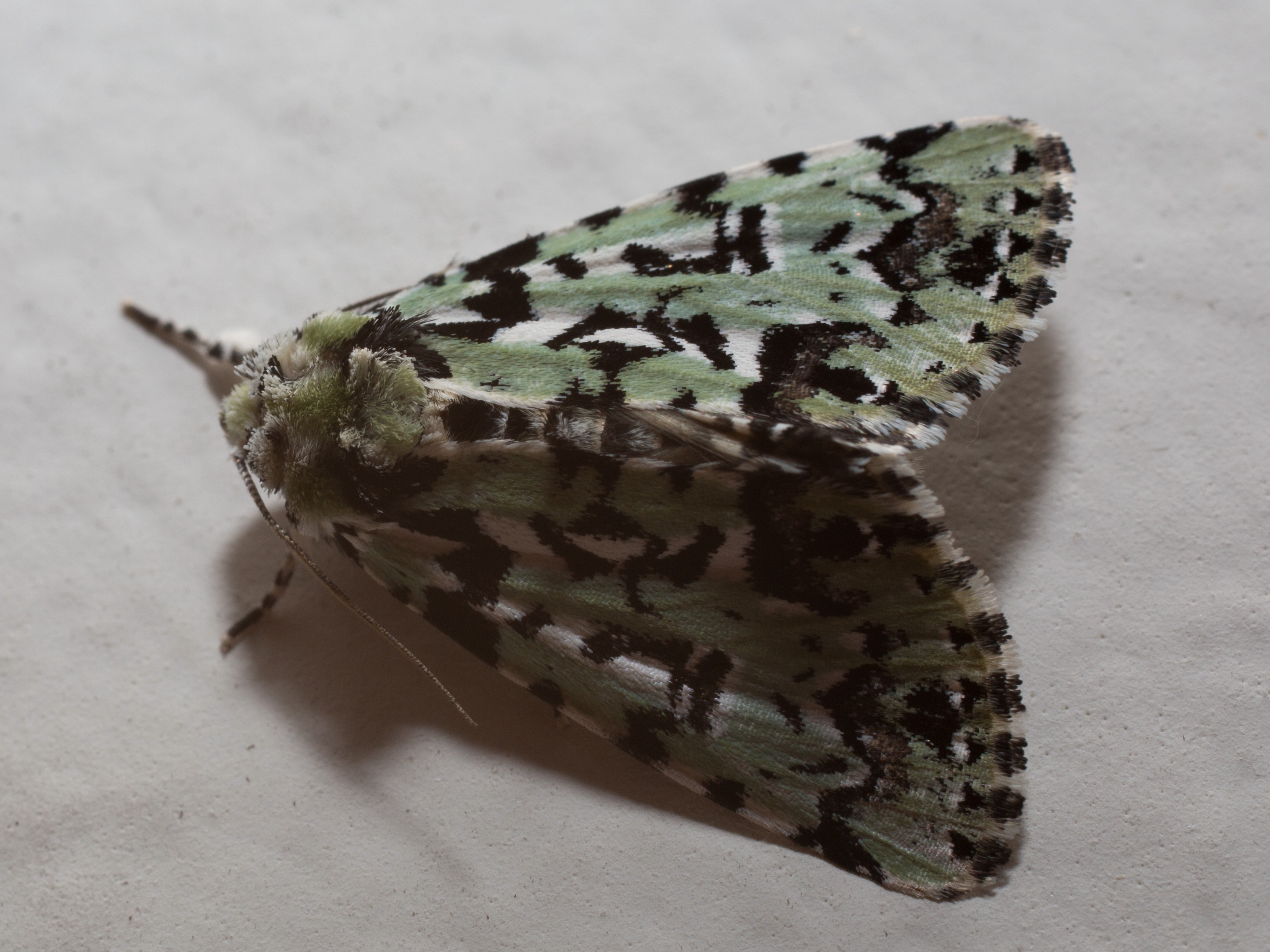 Seladoneule (Moma alpium) in Graz, Waltendorf